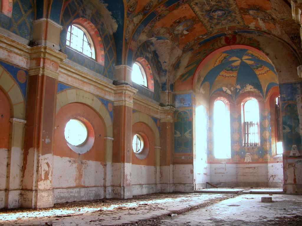 Підупалий стан костелу стааном на 2007р.